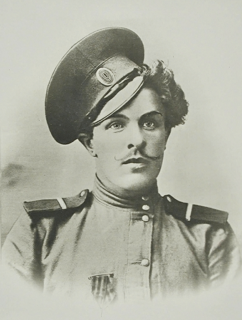 Портрет донского казака Козьмы Крючкова